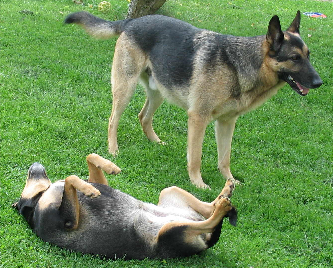 Zwéin Haushënn